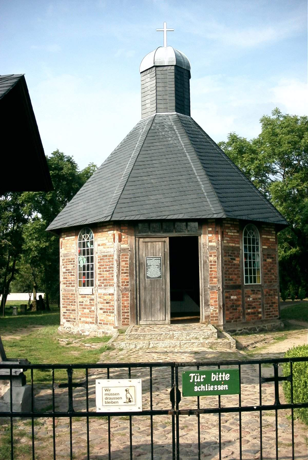 Gustav Adolf Gedächtnis-Kapelle Peenemünde